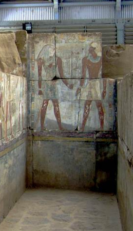 Vue sur une partie des vestiges du Temple d'Horus de Bouhen (Musée National de Khartoum).